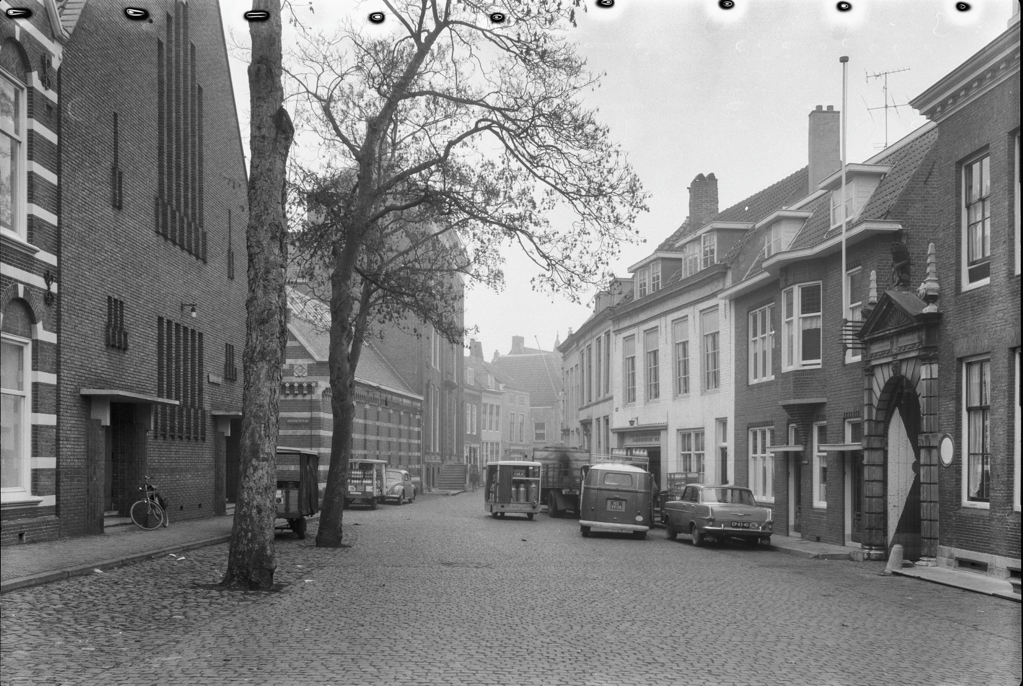 Overzicht Hofplein, naar de Wagenaarstraat